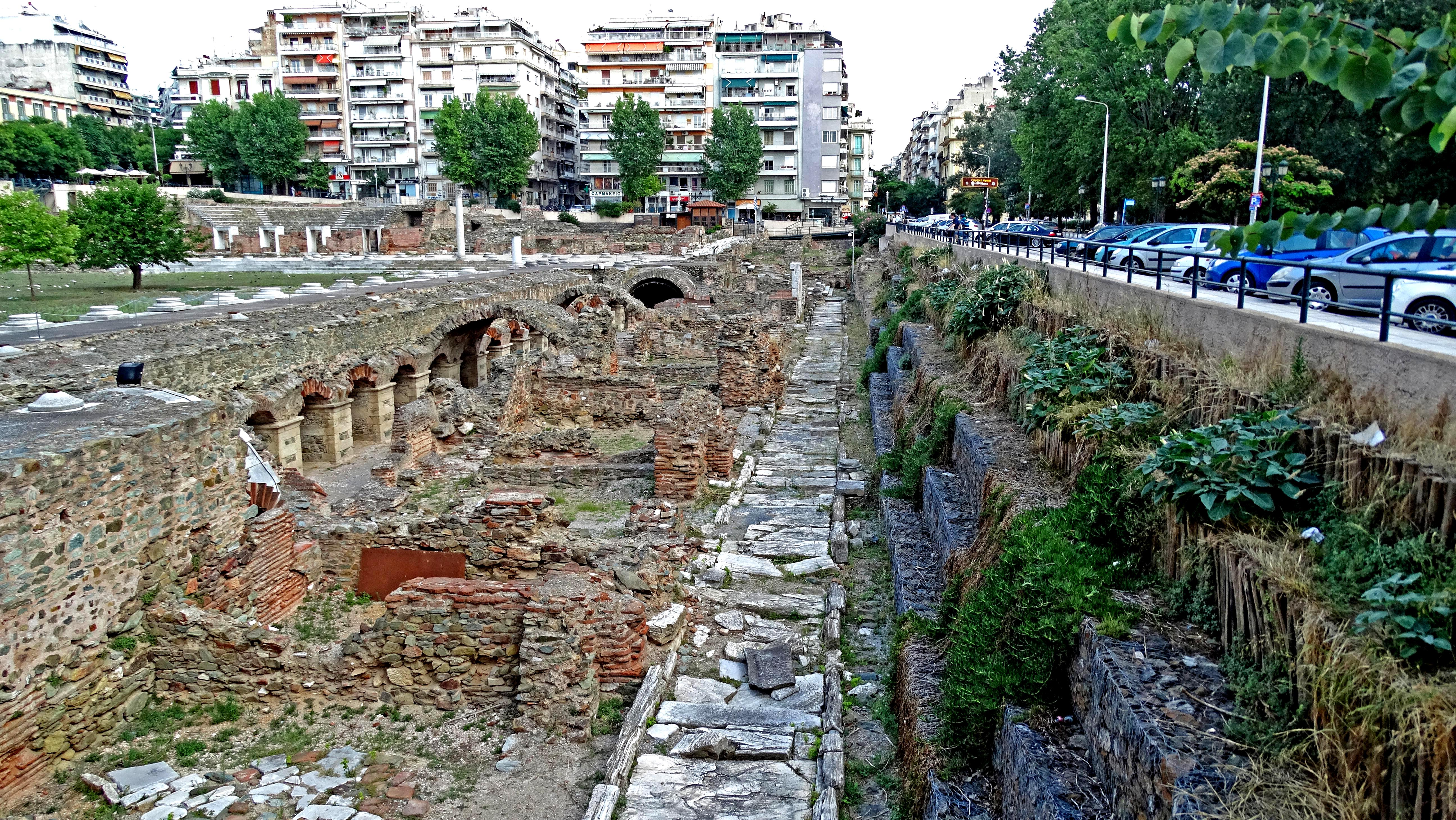 Ρωμαϊκή Αγορά της Θεσσαλονίκης.